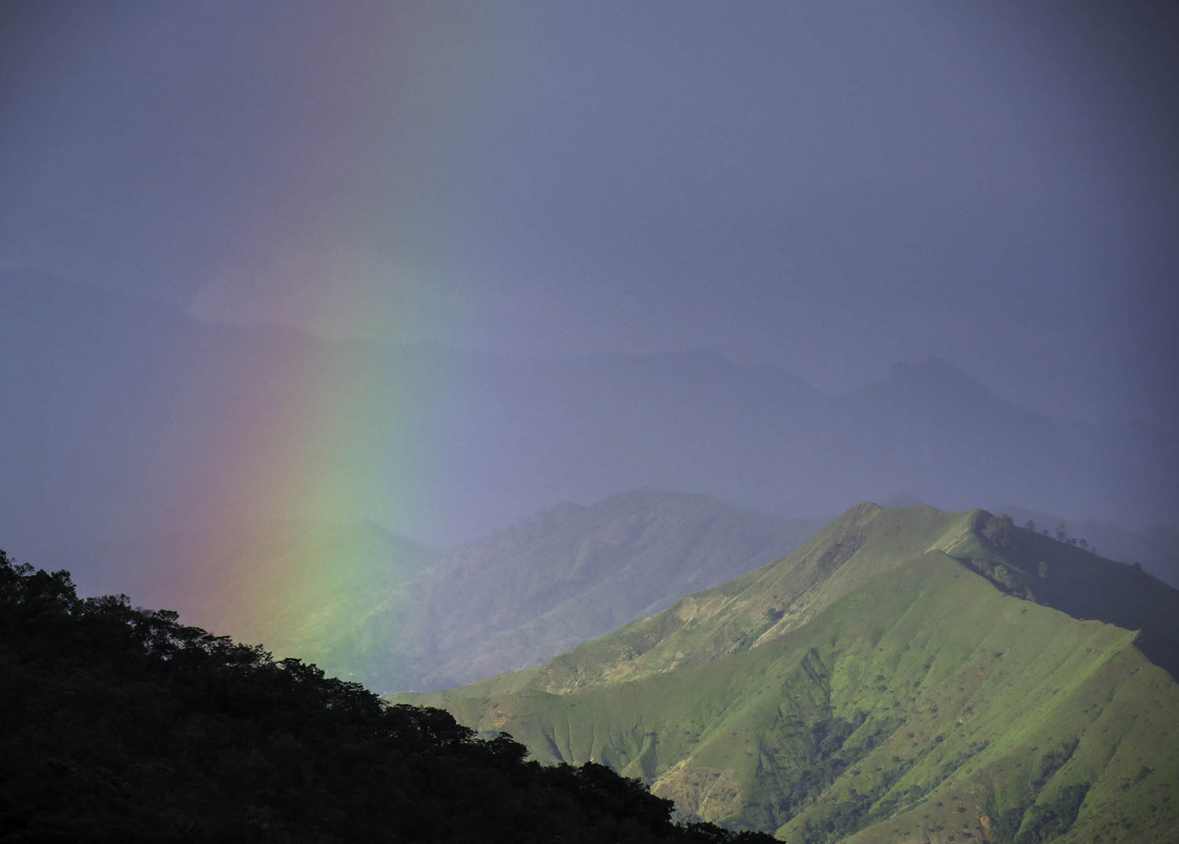 Vista desde el momunento natural Cerro Platillon en San Juan de los Morros Guarico